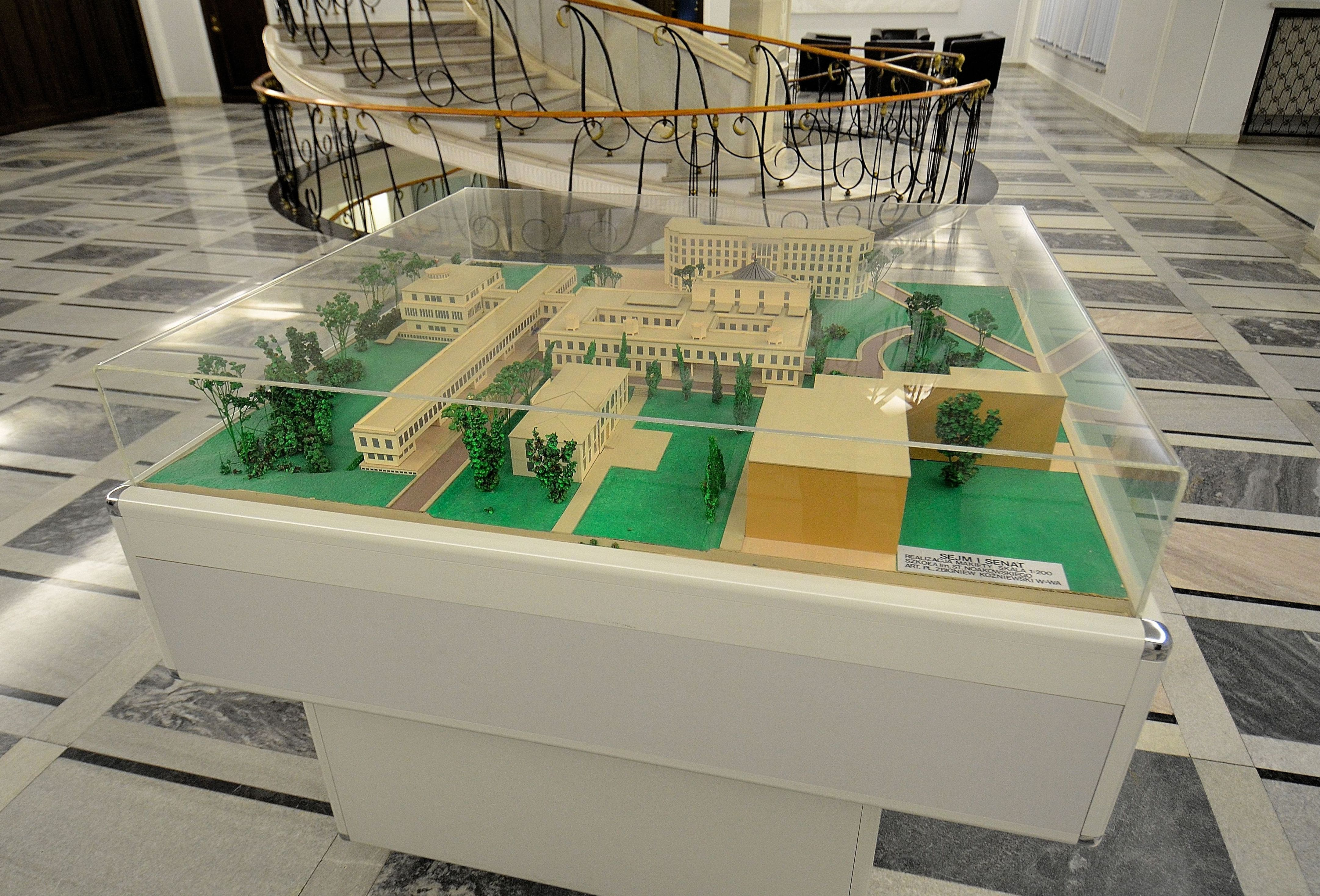 Makieta kompleksu Sejmu i Senatu w gmachu Senatu RP